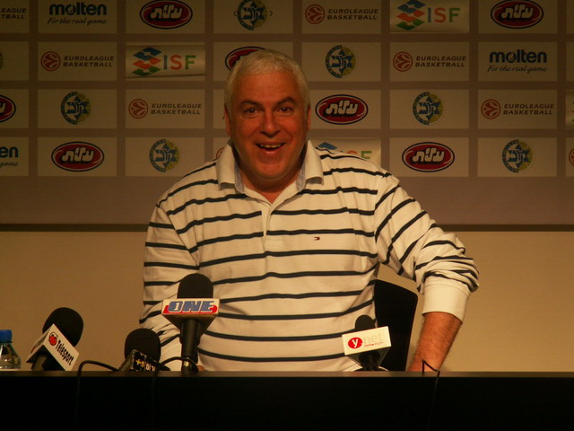 פיני גרשון, המאמן שהביא למכבי 3 גביעי אירופה צולם על-ידי אבי קדמי This picture was taken by Avi Kedmi